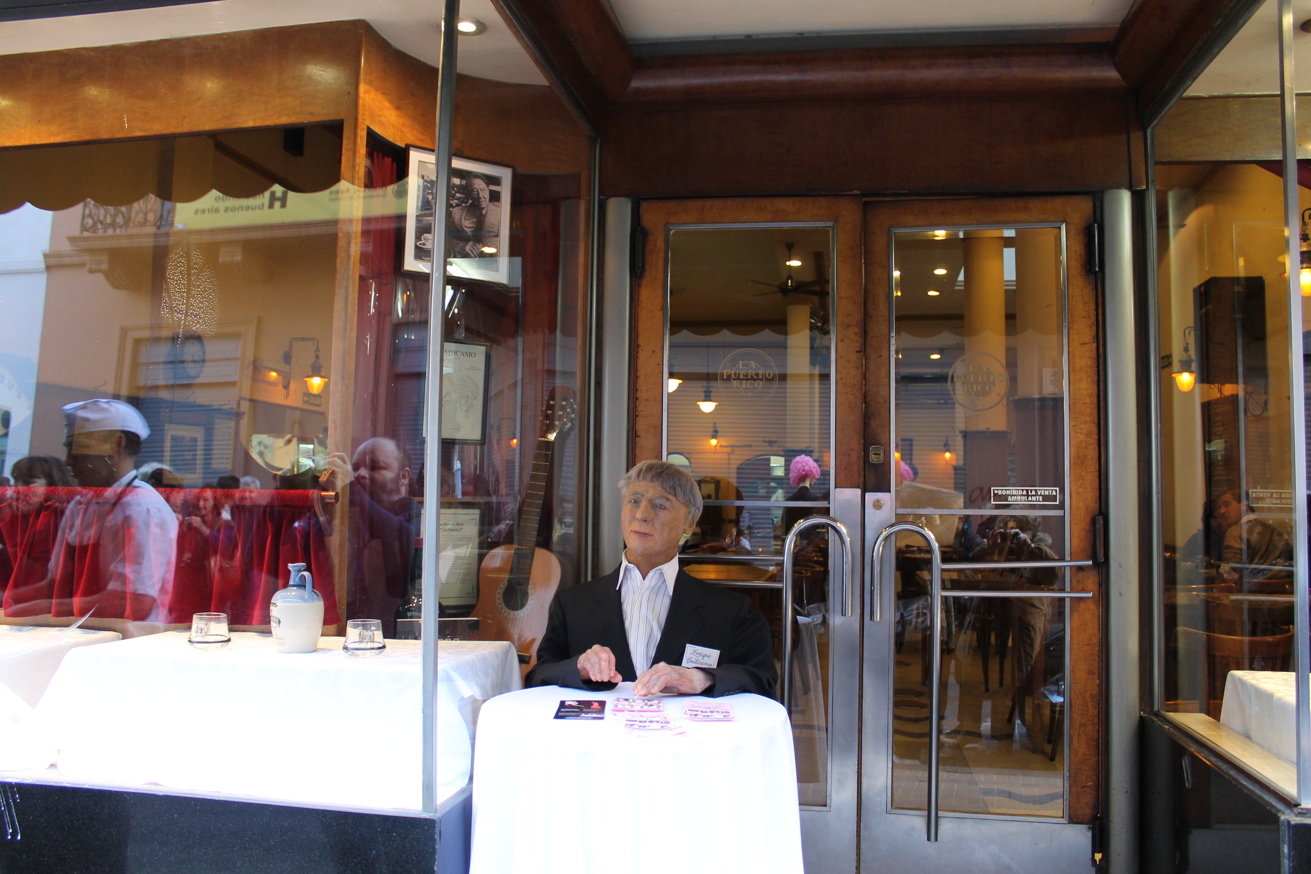 La Puerto Rico